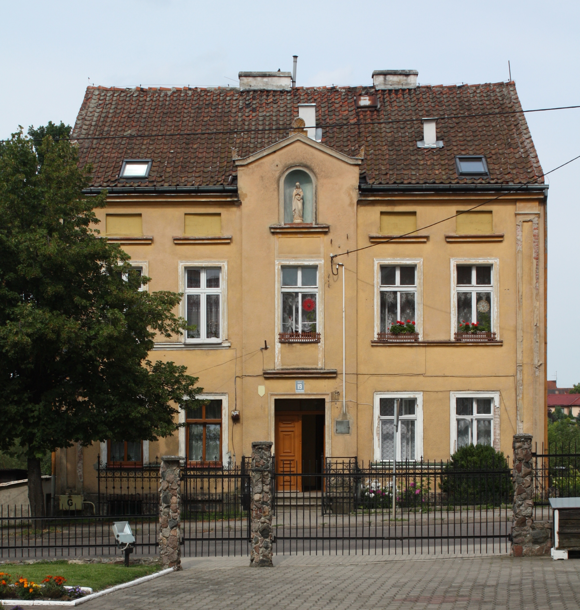 Dobre Miasto - dom, 1920, ul. Grunwaldzka 19 You can see all photographs in category Wikiekspedycja 2012. The making of this document was supported by Wikimedia Polska.